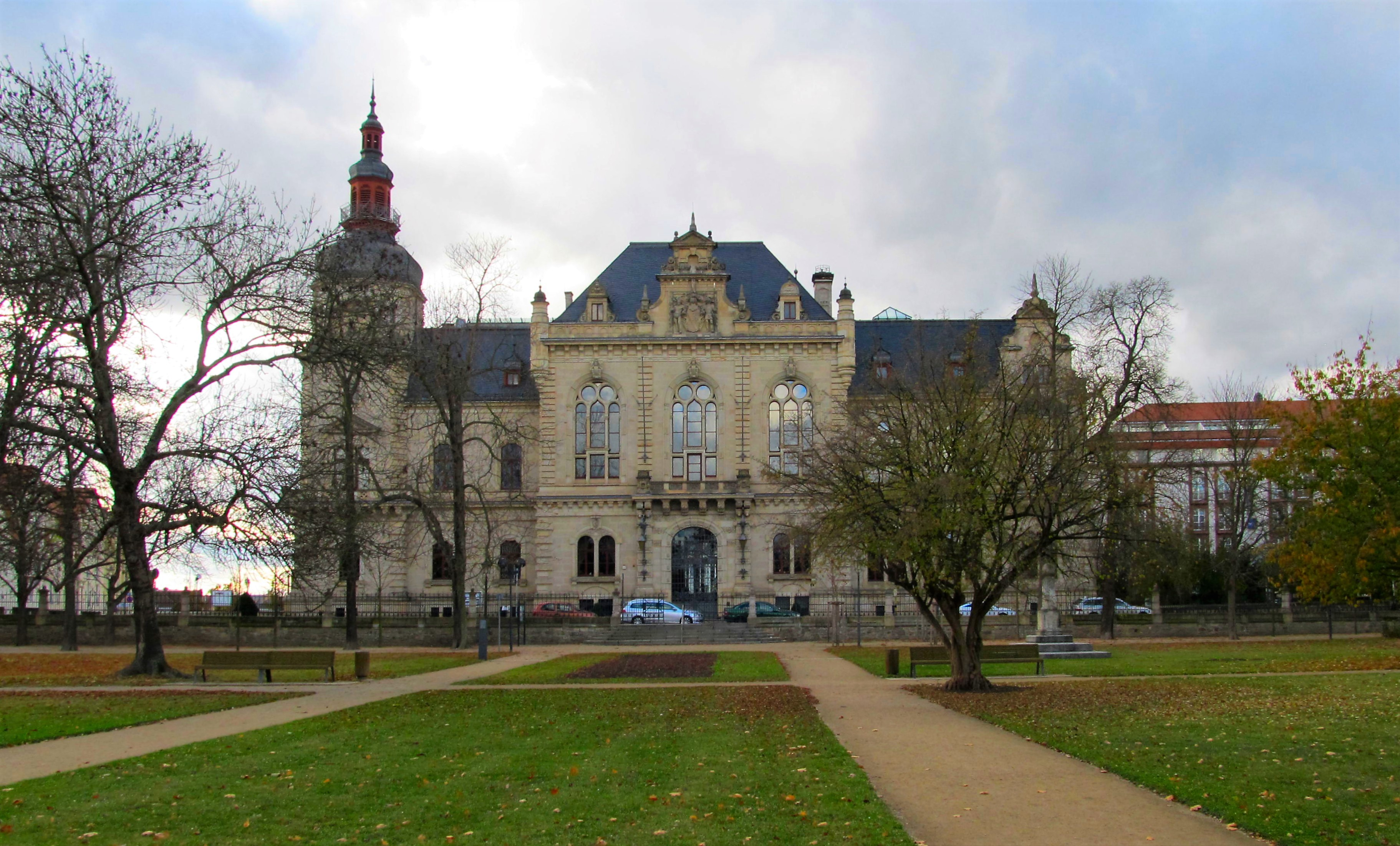 Ständehaus in Merseburg - Front, Vom Schloßgarten aus fotografiert